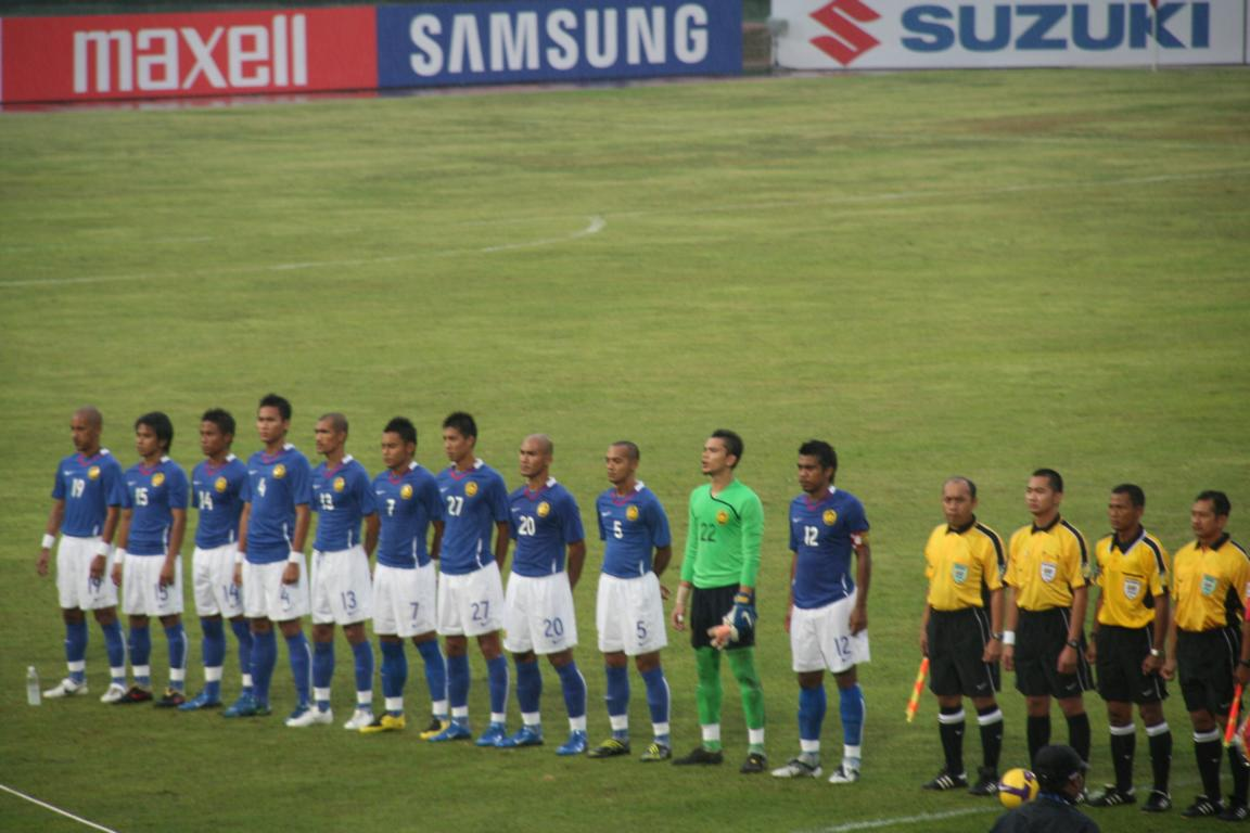 AFF Suzuki Cup 2009, Malaysian National Team